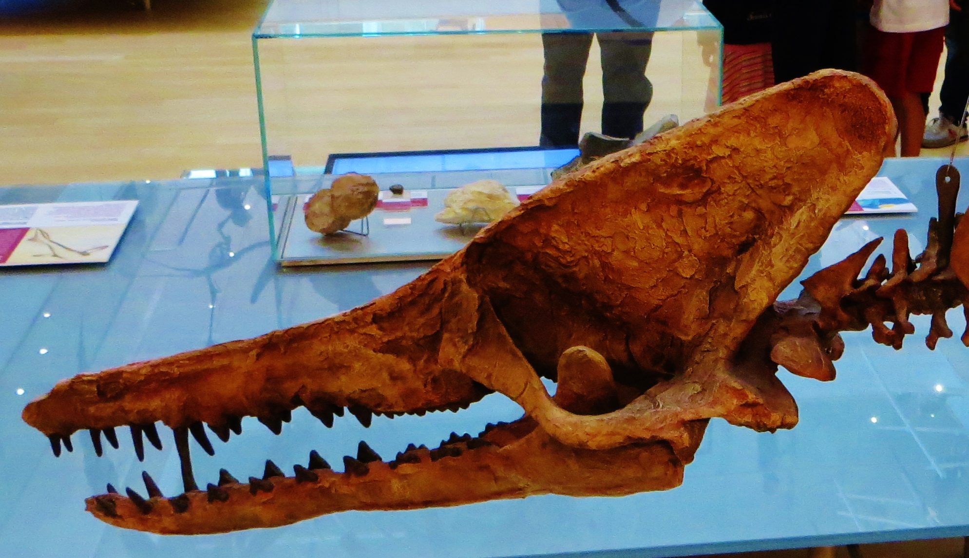 Fossil of Kutchicetus, an extinct mammal- Took the picture at Muse (Trento)